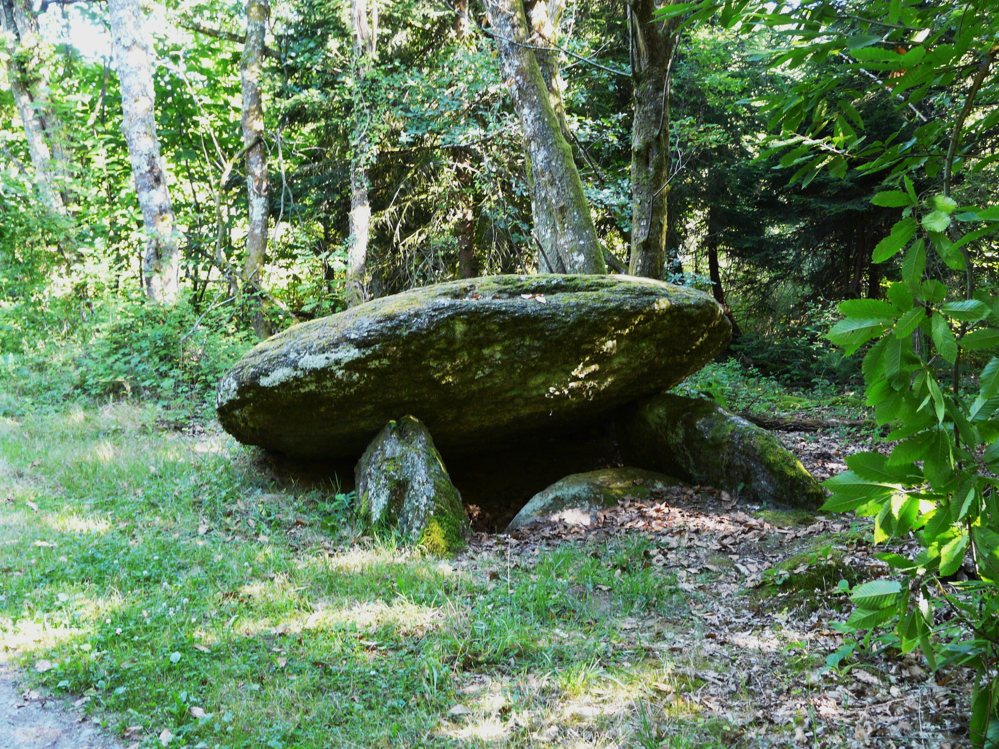 Dolmen de la Pierre Levée, Saint-Jory-de-Chalais, Dordogne, France